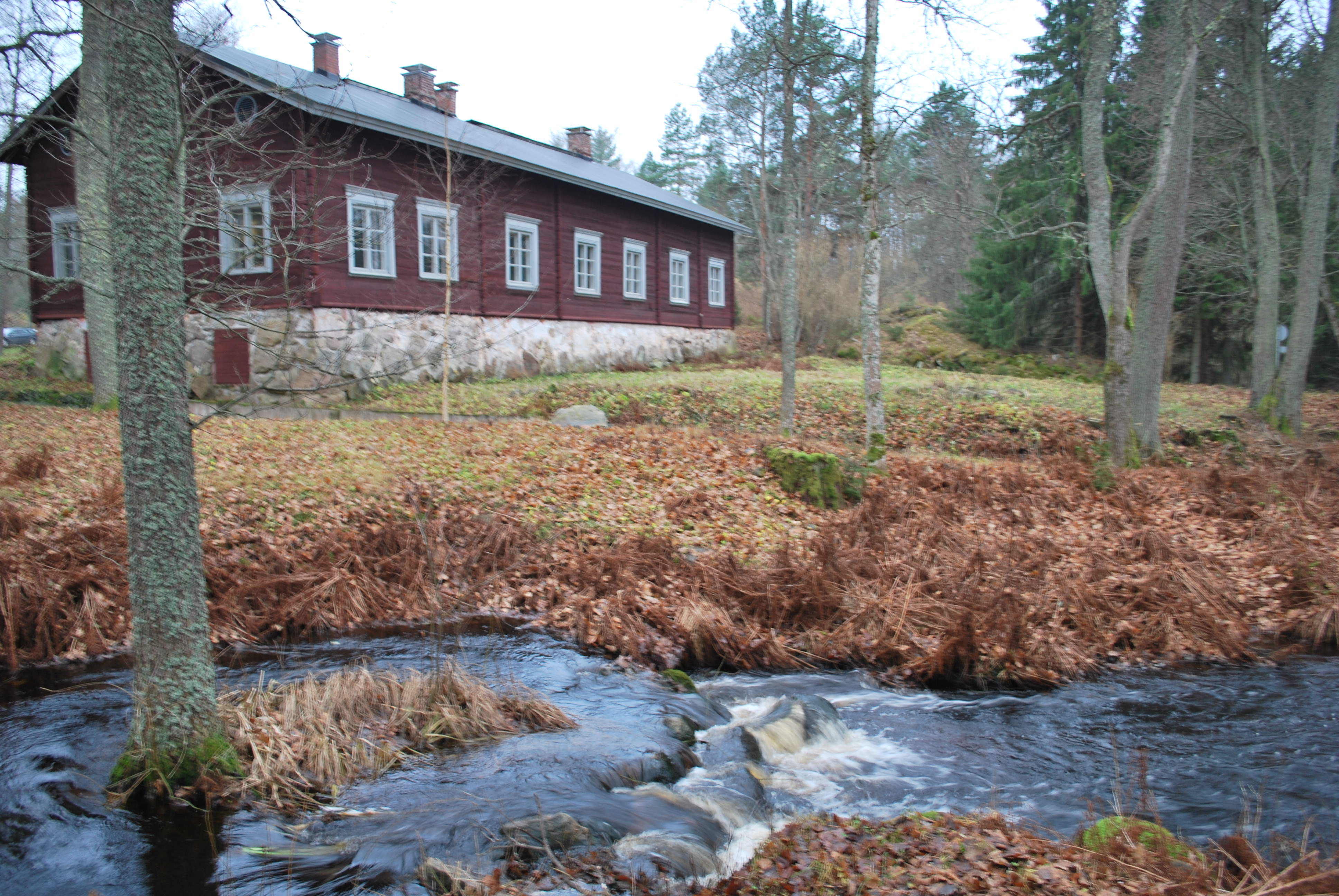 Kirjakkalan Ruukkikylä Meri-Teijossa Hamarijärven rannalla.